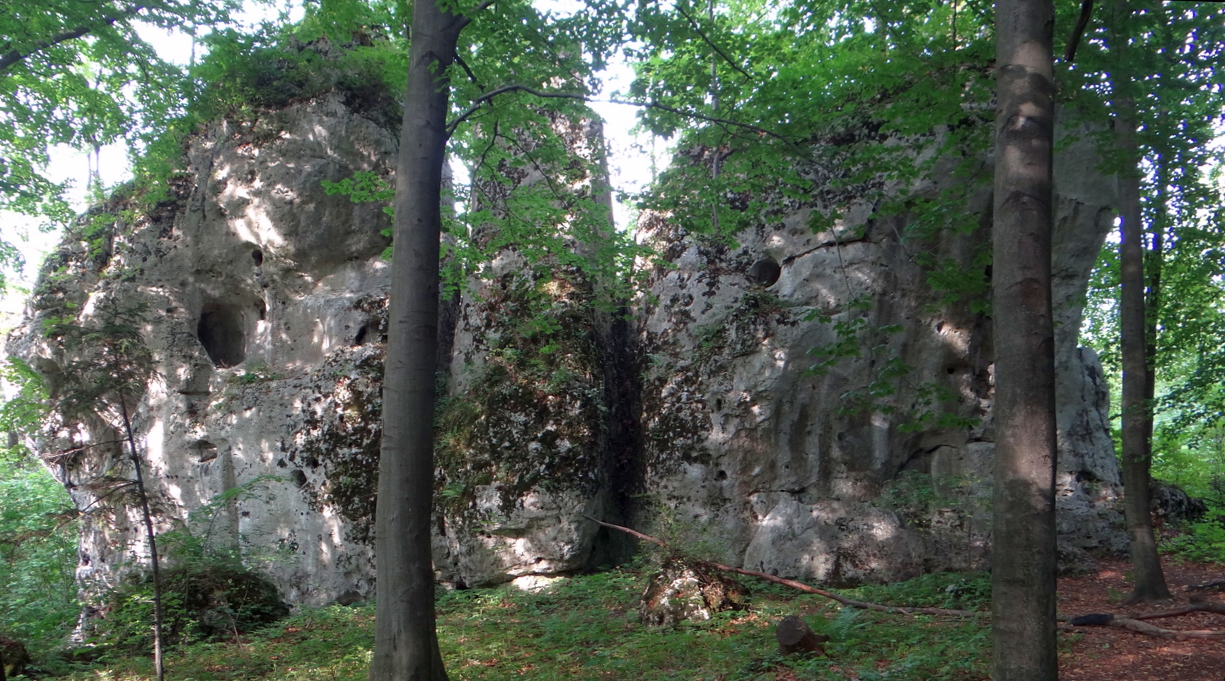 Skały 7 Projektów i Szczurek w Parku Jurajskim w Smoleniu